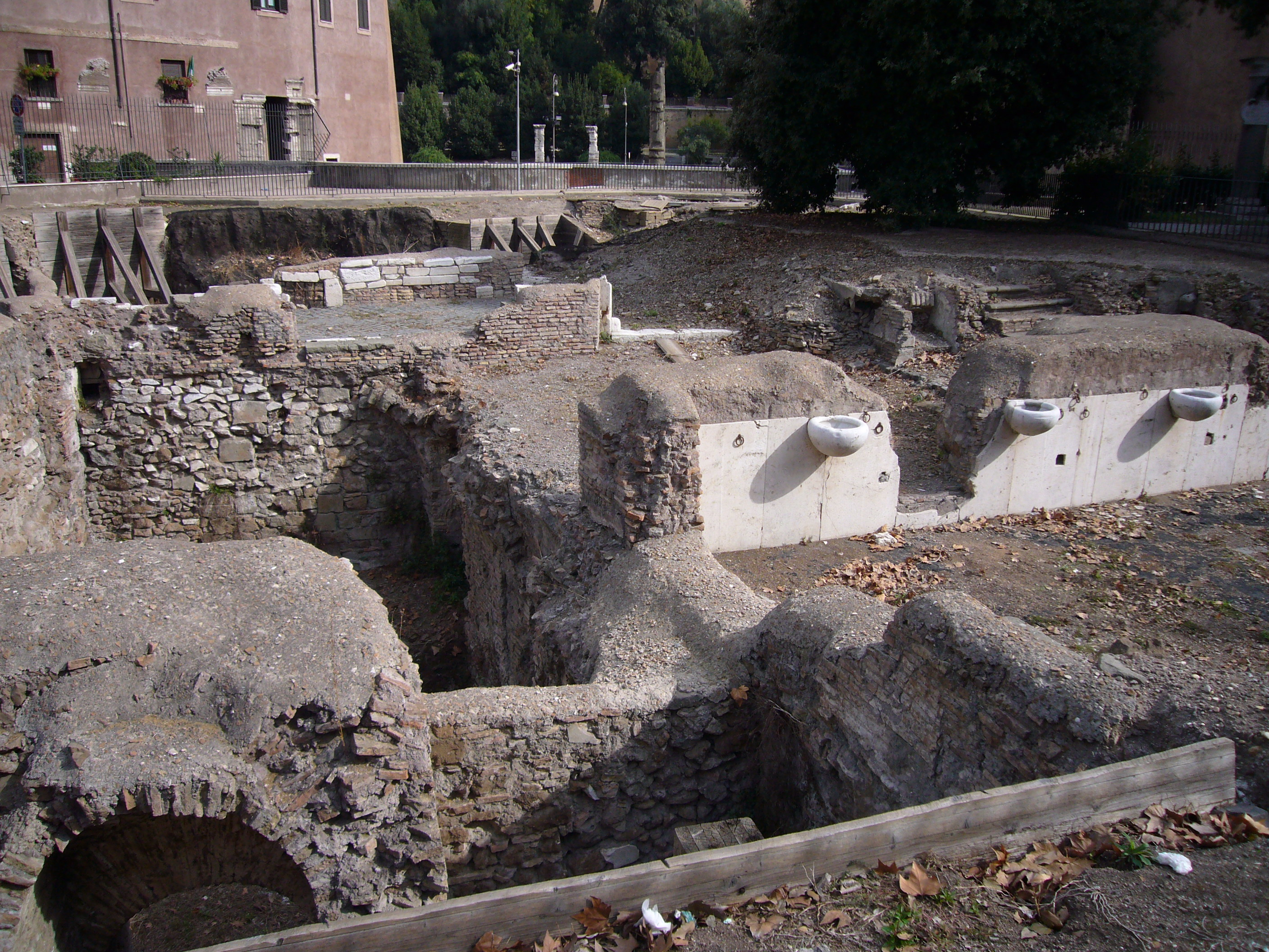 Roma, piazza di Monte Savello. Scavi delle case medievali Pierleoni e poi Savelli